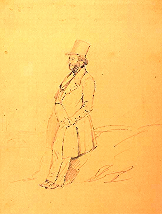 William Wheelwright (Guillermo Wheelwright, en la historiografía chilena y argentina) jugó un papel esencial en el desarrollo del barco a vapor y los ferrocarriles en Chile y otras partes de Sudamérica. En 1838, con la ayuda del Gobierno de Chile, fundó la Pacific Steam Navigation Company, que comenzó a operar el 15 de octubre de 1840, preocupándose del comercio naval entre las ciudades de Valparaíso y el Callao.